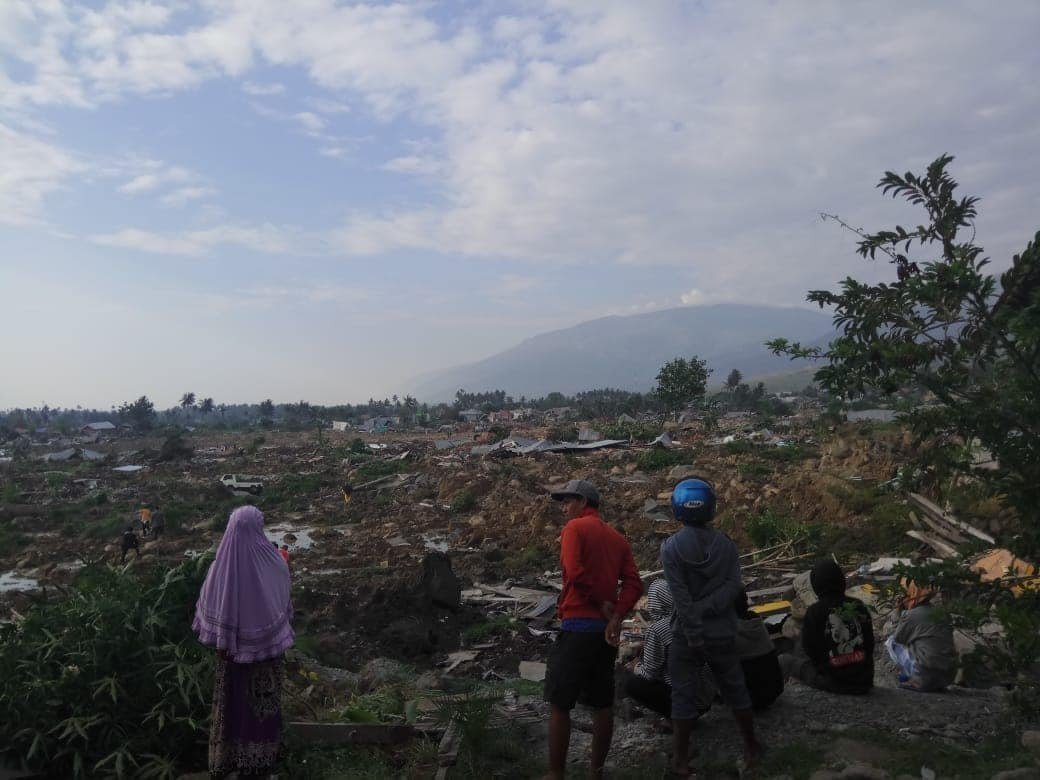 Séisme en 2018 à Palu dans l'île de Célèbes